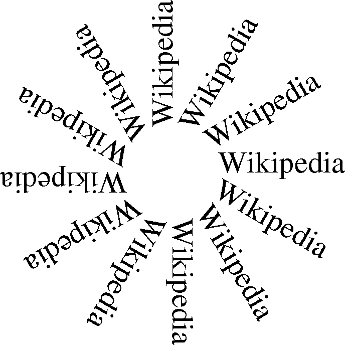 PostScript example